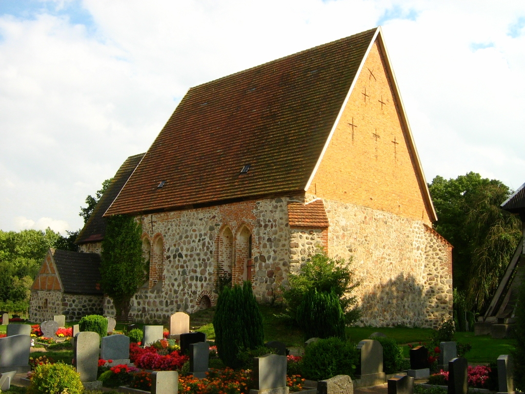 Die Dorfkirche in Thelkow, Landkreis Bad Doberan, Mecklenburg. 52°2′15.16″N 12°33′40.28″E / 52.0375444°N 12.5611889°E